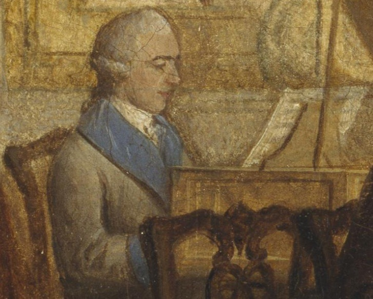 Kenneth Mackenzie, 1st Earl of Seaforth, 1744 - 1781, at home in Naples: concert party (Gennaro D'Alessandro); attributed by Giovanni Tribuzio (2016)